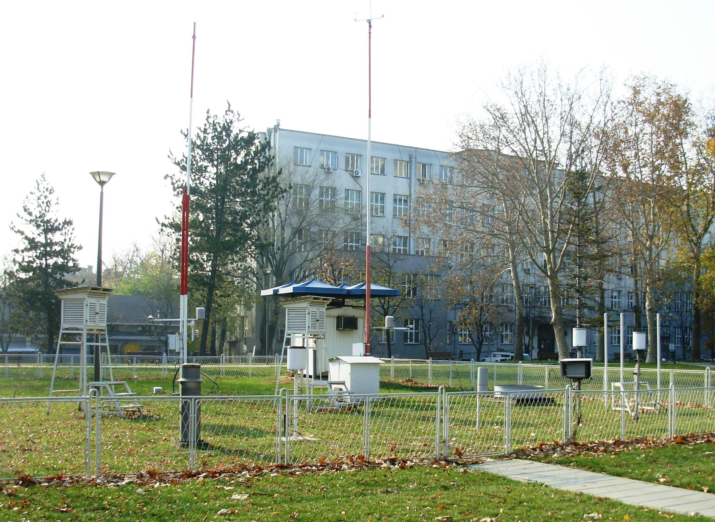 Meteorološka stanica Karađorđev park, Beograd. Slikao Goldfinger